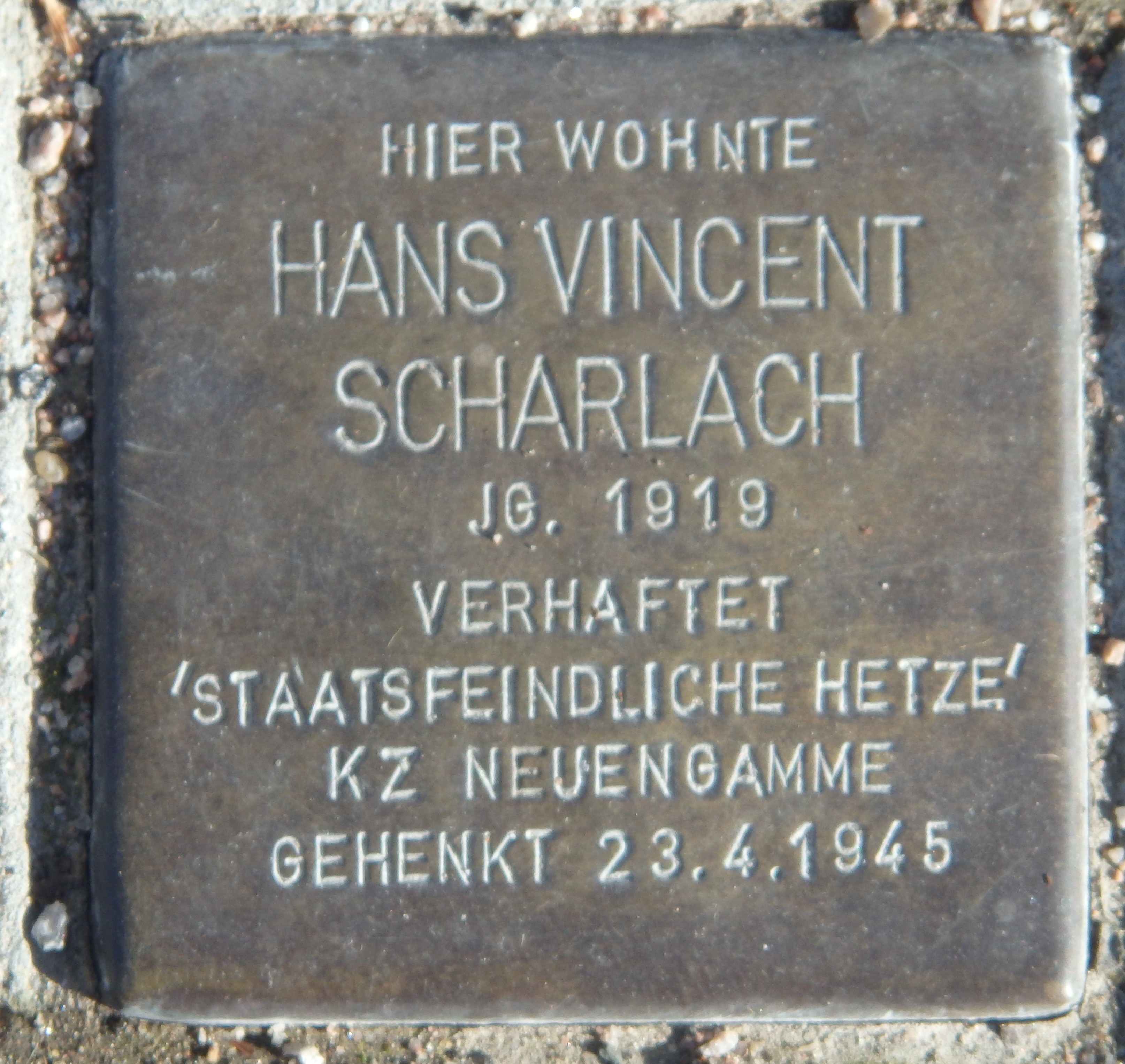 Bild des Stolpersteins